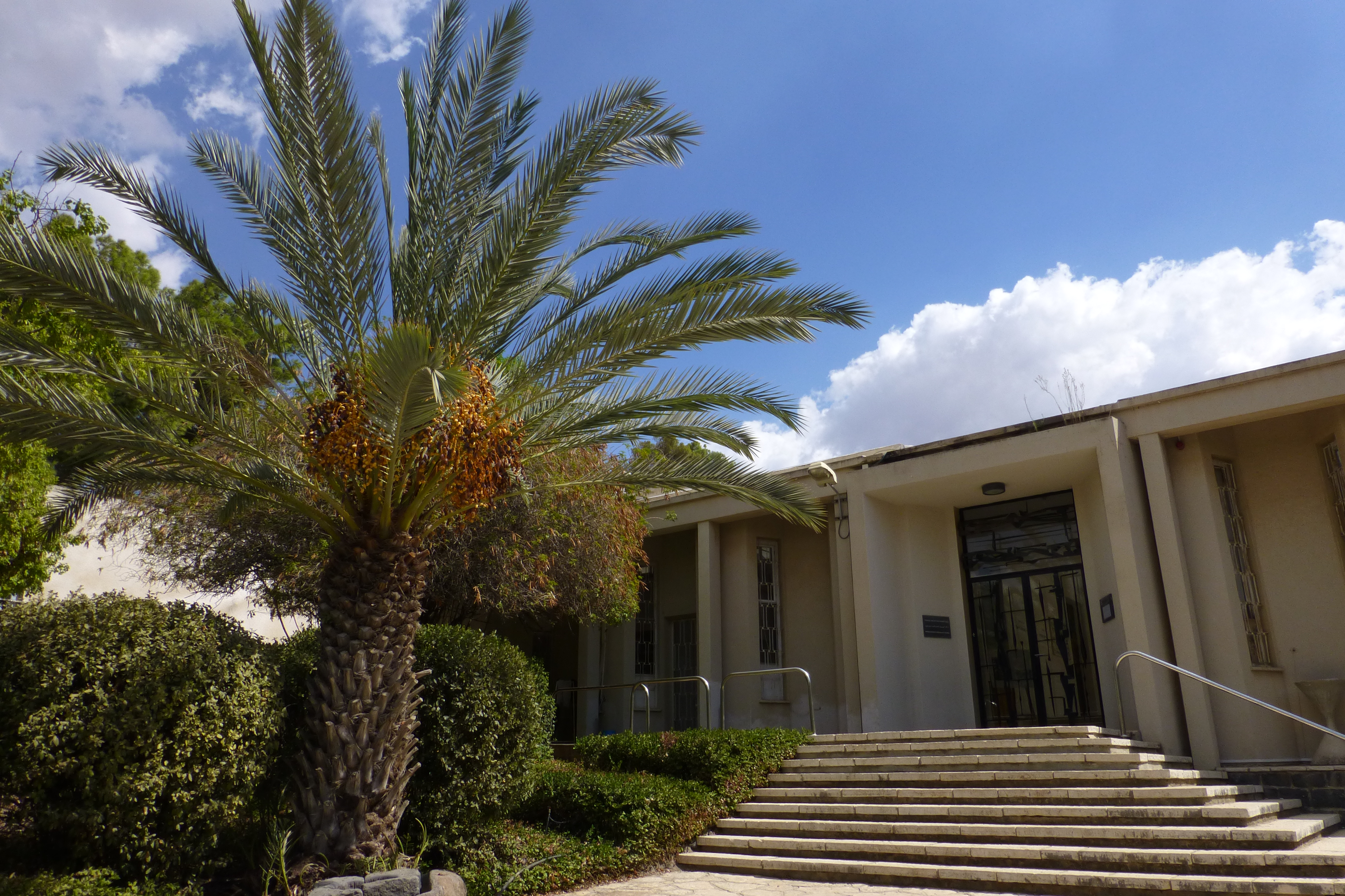 "המשכן לאמנות על שם חיים אתר" או "המשכן לאמנות, עין חרוד" הנו מוזיאון לאמנות ישראלית שהוקם בשנת 1937 בקיבוץ עין חרוד.